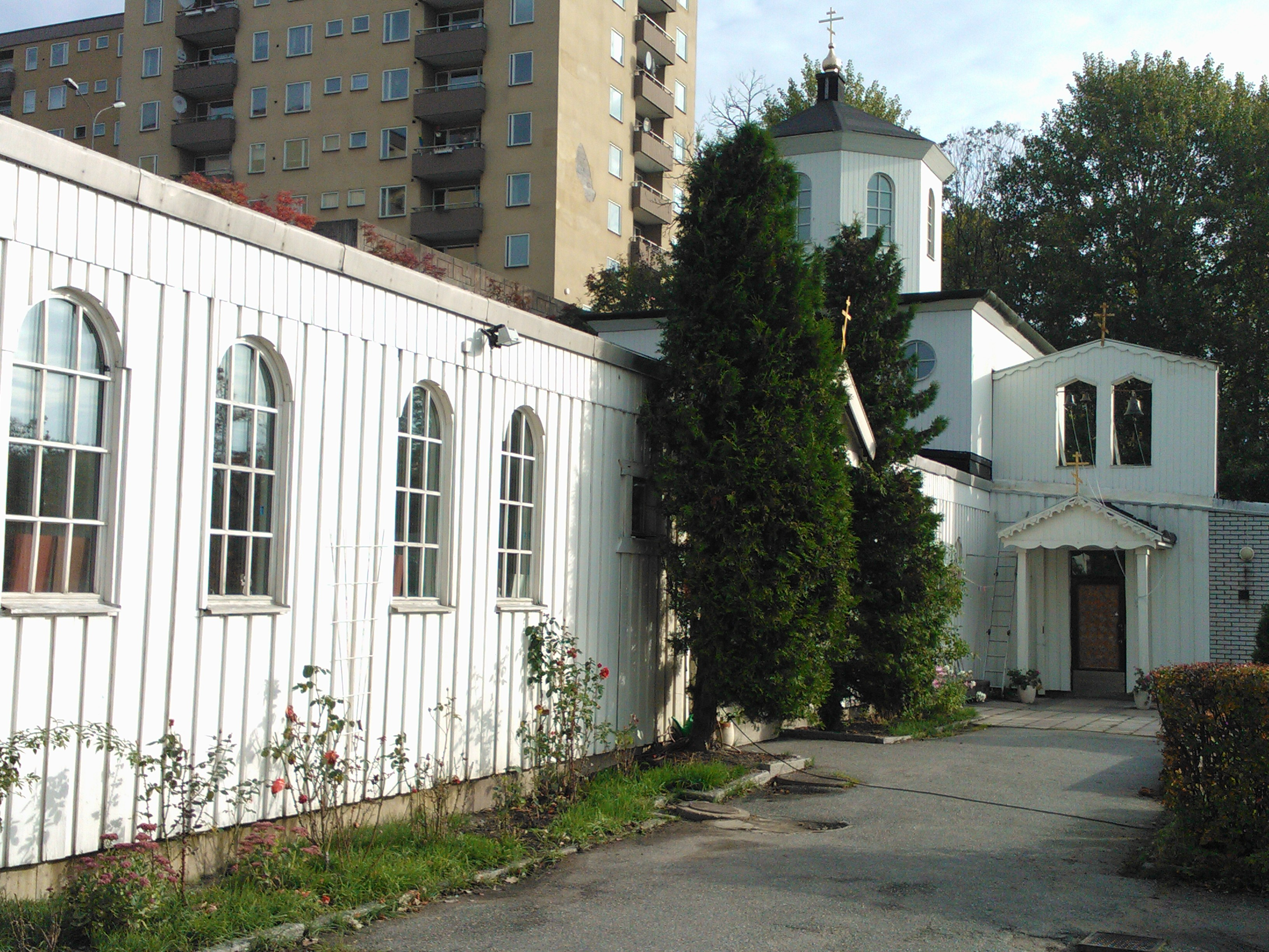 Церковь свв. Константина и Елены (р-н Ворберг, Стокгольм)